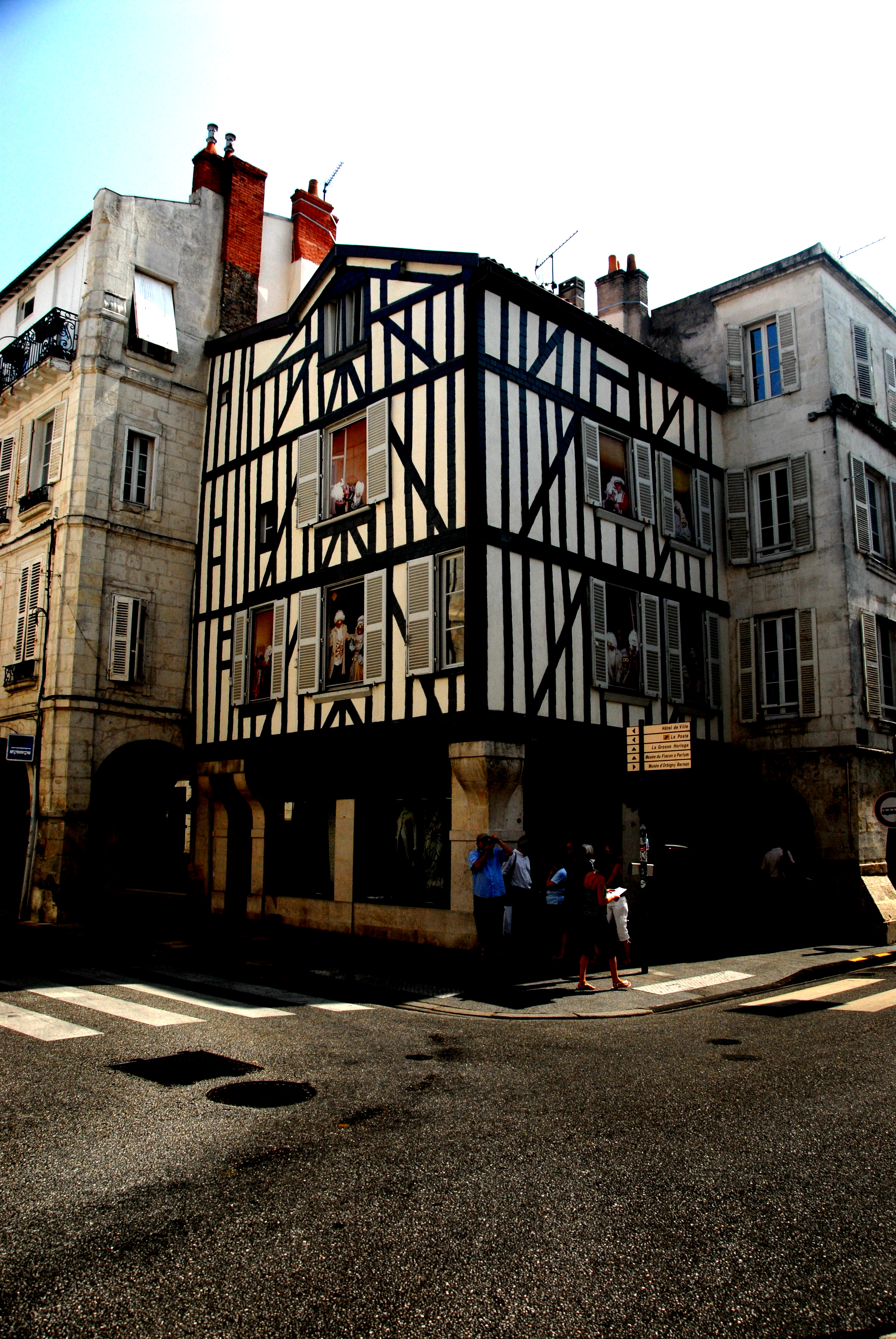 La Rochelle, Eckhaus in Fachwerk